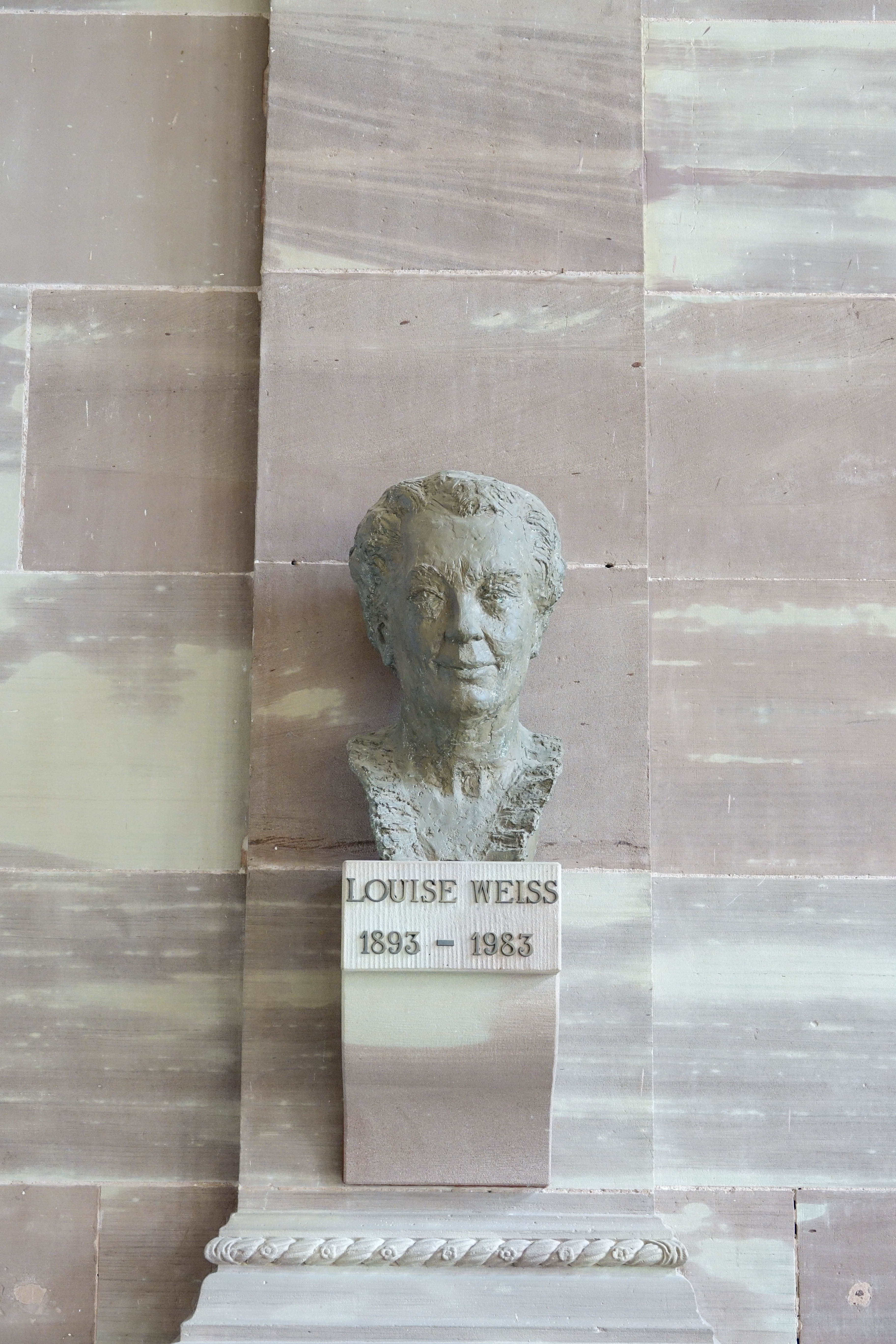 Buste de Louise Weiss à l'intérieur du château des Rohan à Saverne (Bas-Rhin, France).